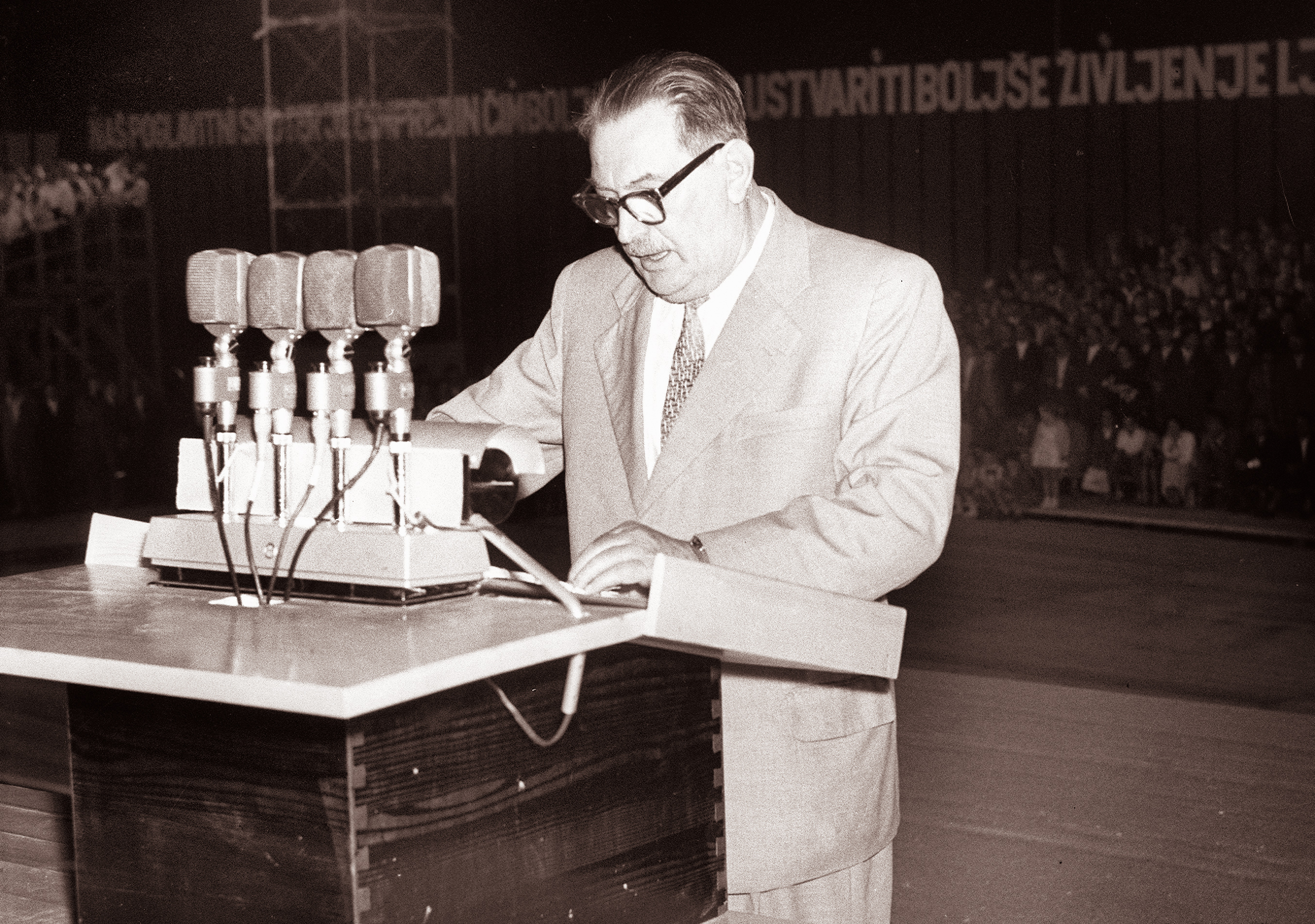 Franc Leskošek